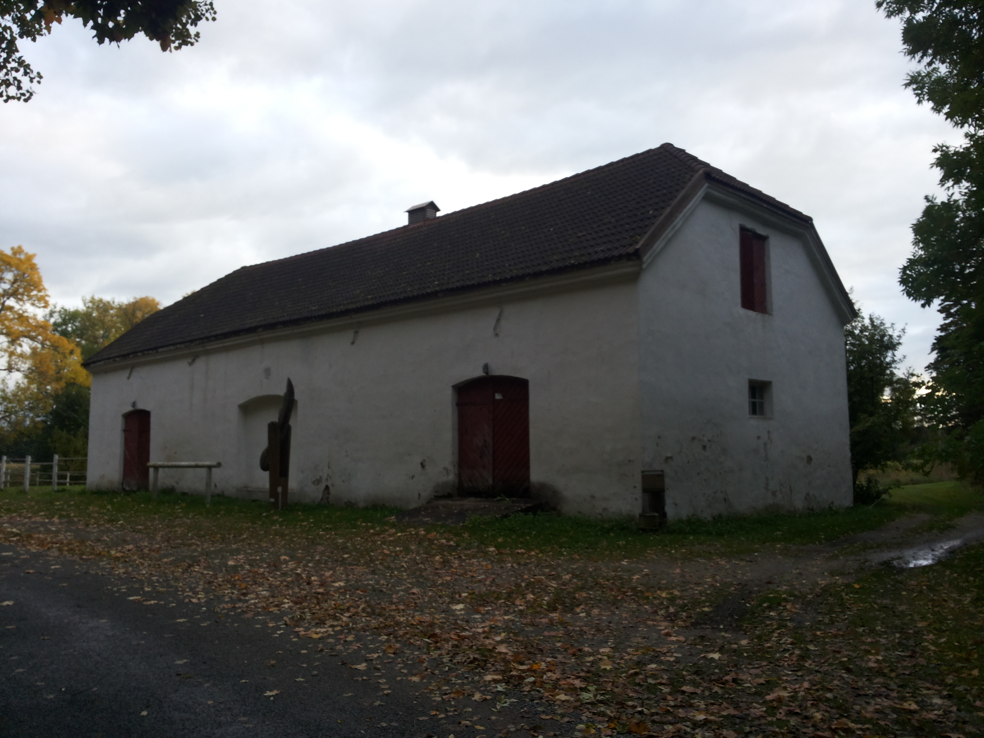 Sagadi mõisa hobusetall